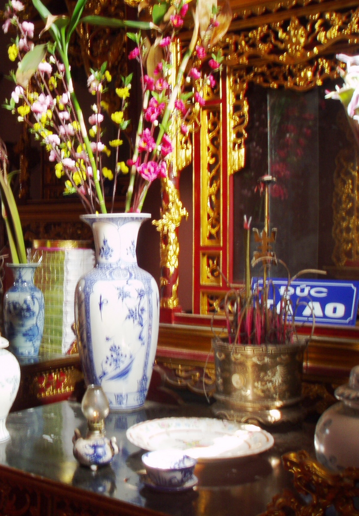 Ban thờ Tả Ao, Bảo Công (Lữ Gia), Lang Công (Nguyễn Danh Lang), Cao Vương (Cao Biền) tại đền Nam Trì, xã Đặng Lễ, huyện Ân Thi, tỉnh Hưng Yên.